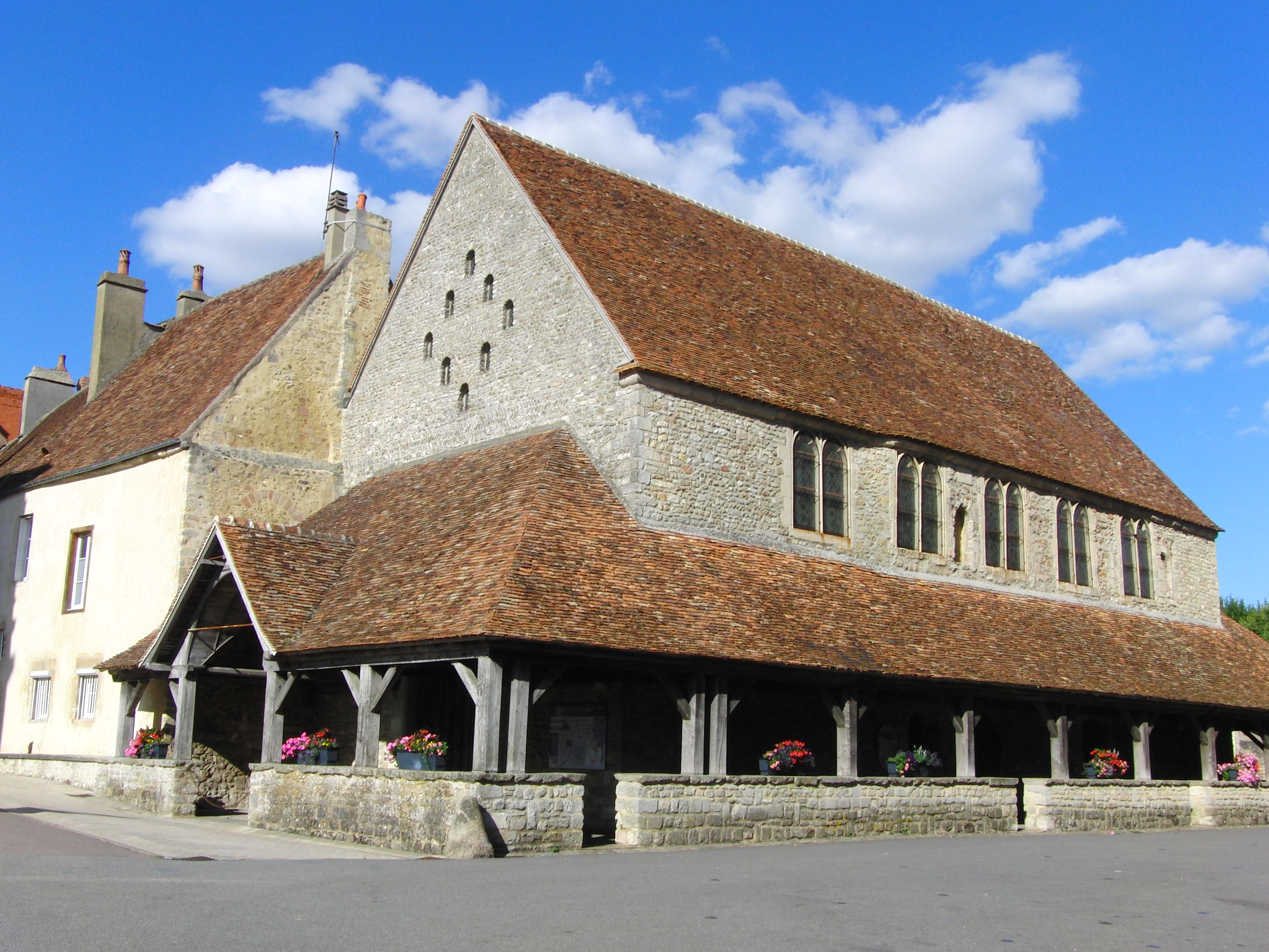 Chapelle canoniale de Sées, Orne, France .